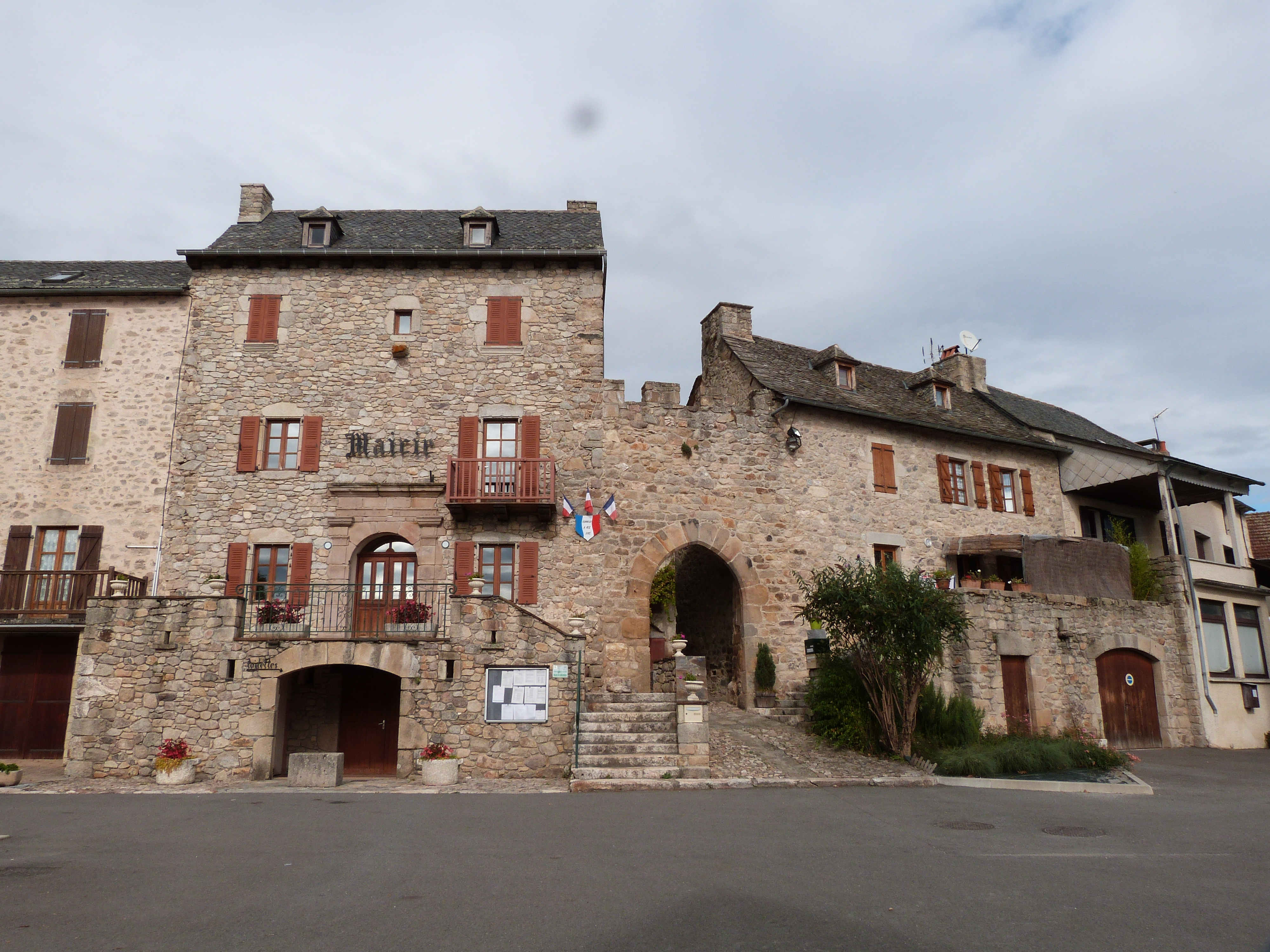 Façade de la mairie donnant sur la place principale